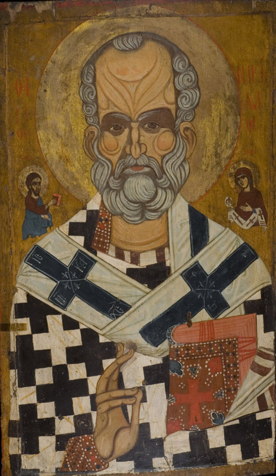 Ο Άγιος Νικόλαος 15ος αι. Βέροια, Ναός της Παναγίας Χαβιαράς